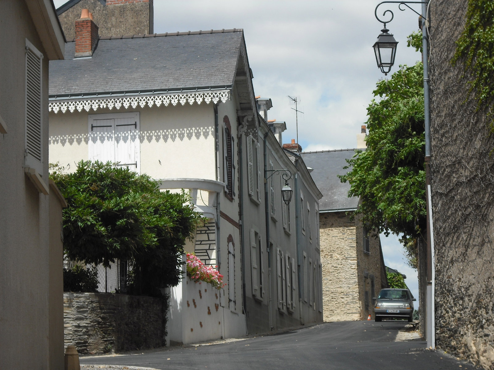 Rue Souche-de-Vigne, Candé, Maine-et-Loire, France.